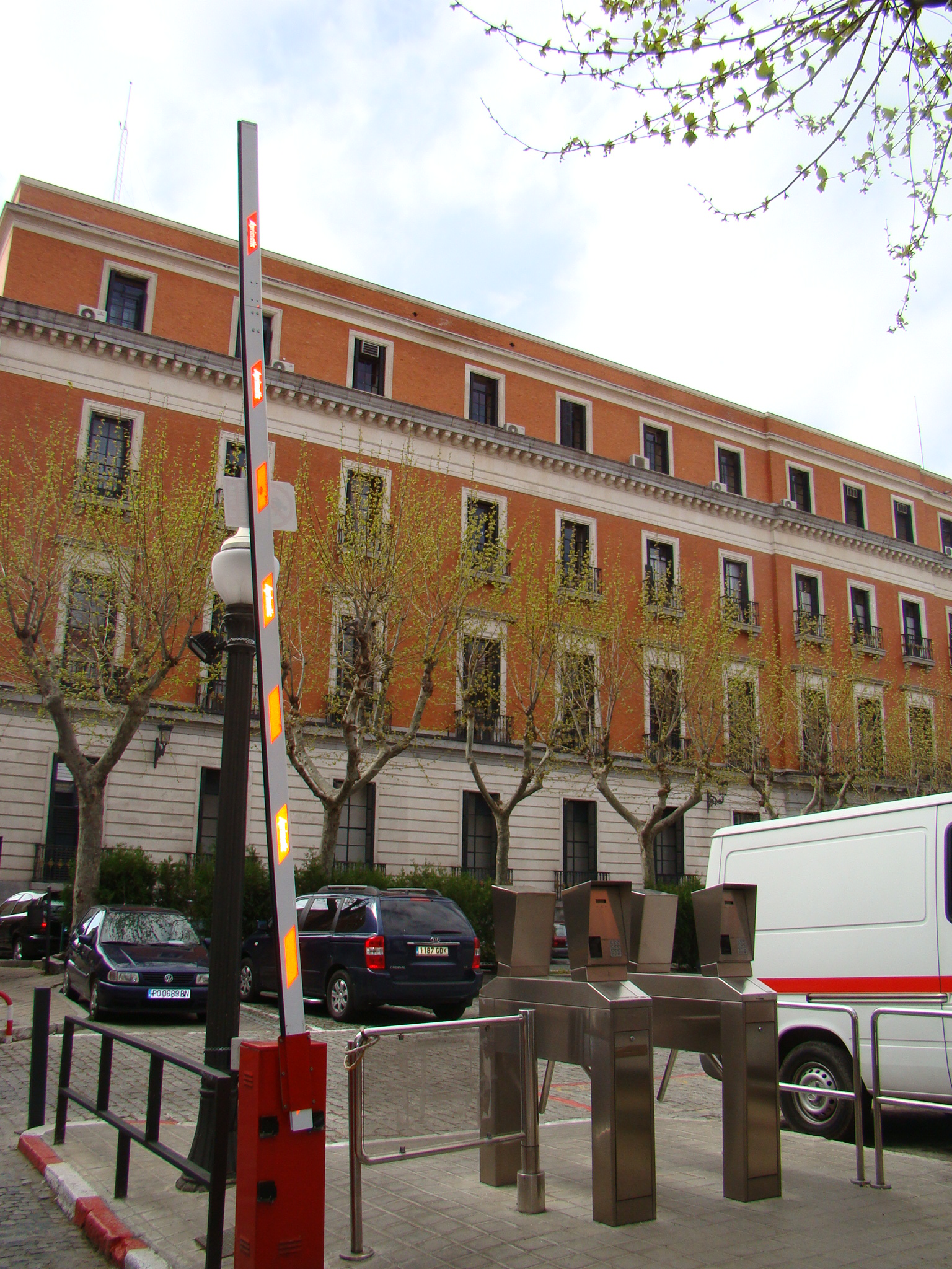 Palacio de Buenavista de Madrid, Cuartel General del Ejército de Tierra de España